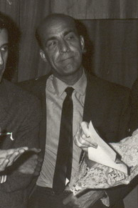 Reunión del grupo literario cubano Casa de las Américas